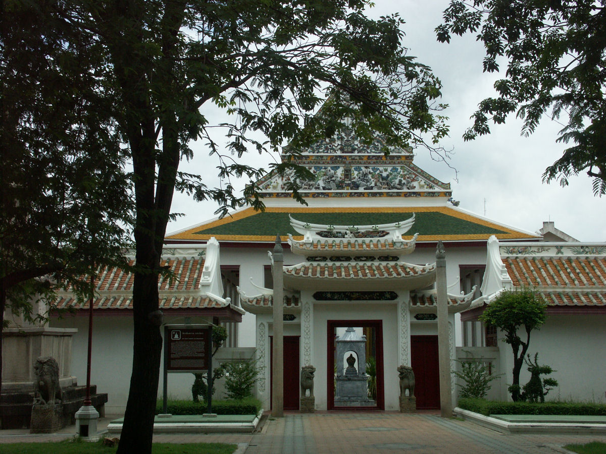 Wat Ratchaorotsaram (วัดราชโอรสาราม), Bangkok, Thailand